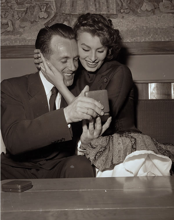 Hallgeir Brenden gratuleres av den italienske divaen Sophia Loren etter sitt OL-gull i Cortina 1956.